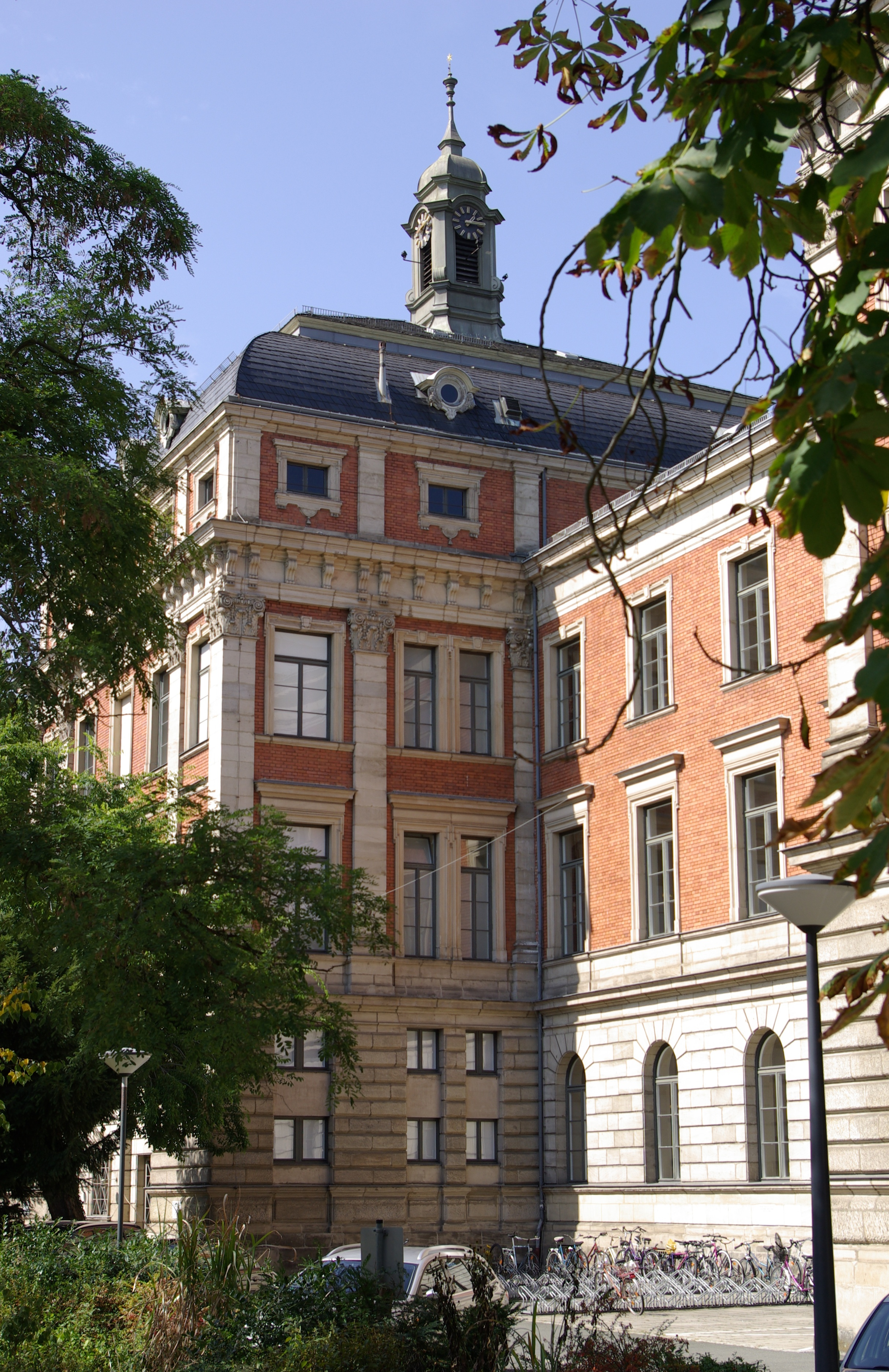 Kollegienhaus der Friedrich-Alexander-Universität in Erlangen